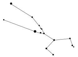 Ursprunglig bild "Taurus.png" uppladdad under nytt namn, för att ge möjlighet ta bort den och istället få in bild från från Commons.